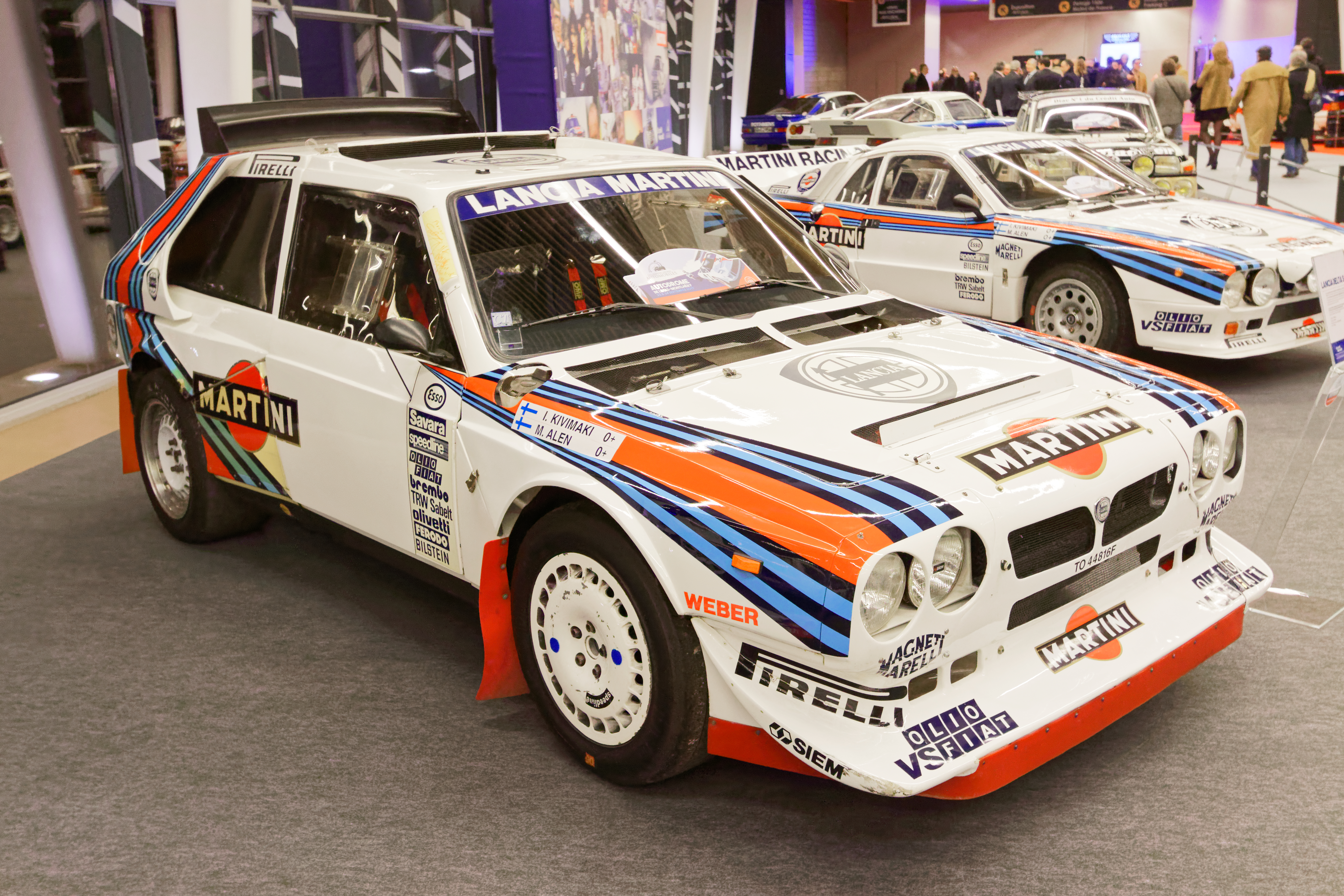 Une Lancia Delta S4 de 1986 (?) exposée lors du salon Rétromobile 2017.